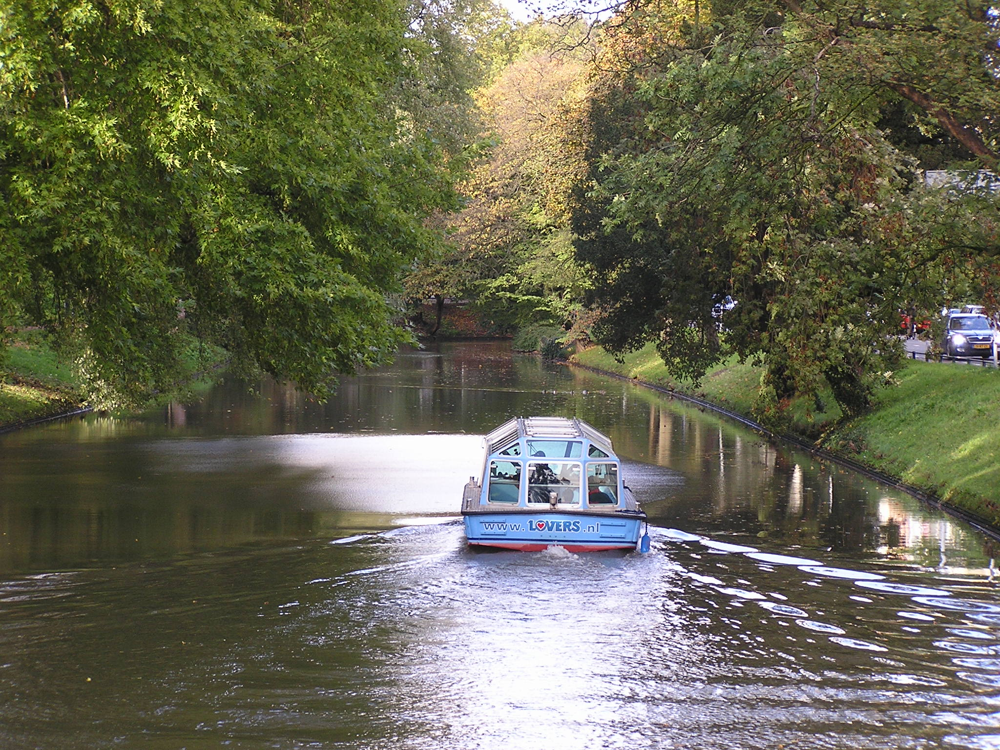 Boat of Rederij Lovers